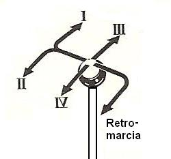 Disegno eseguito dal sottoscritto (Giomayo) utilizzando il progtramma "Paint" di Windows ed attingendo la necessaria informazione da libri e riviste varie trattanti l'argomento automobilismo"